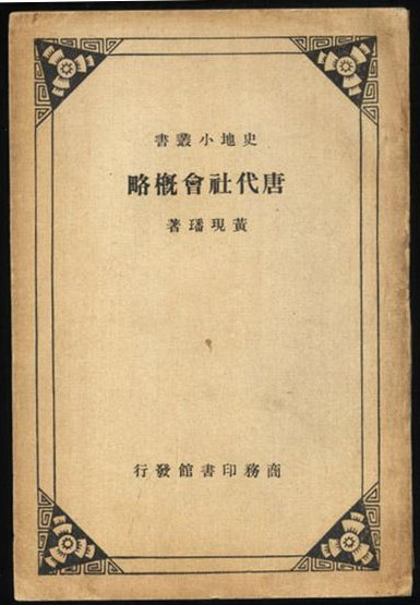 中文（中国大陆）: 此为著作作品第一版（作品初版于1936年）封面，已过50年，进入公共领域。封面摄影作者不明。